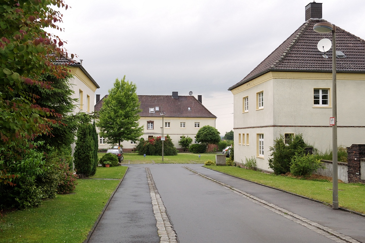 Bergbaubeamtensiedlung "Am Knie" in Dortmund-Neuasseln This is a photograph of an architectural monument. 0002